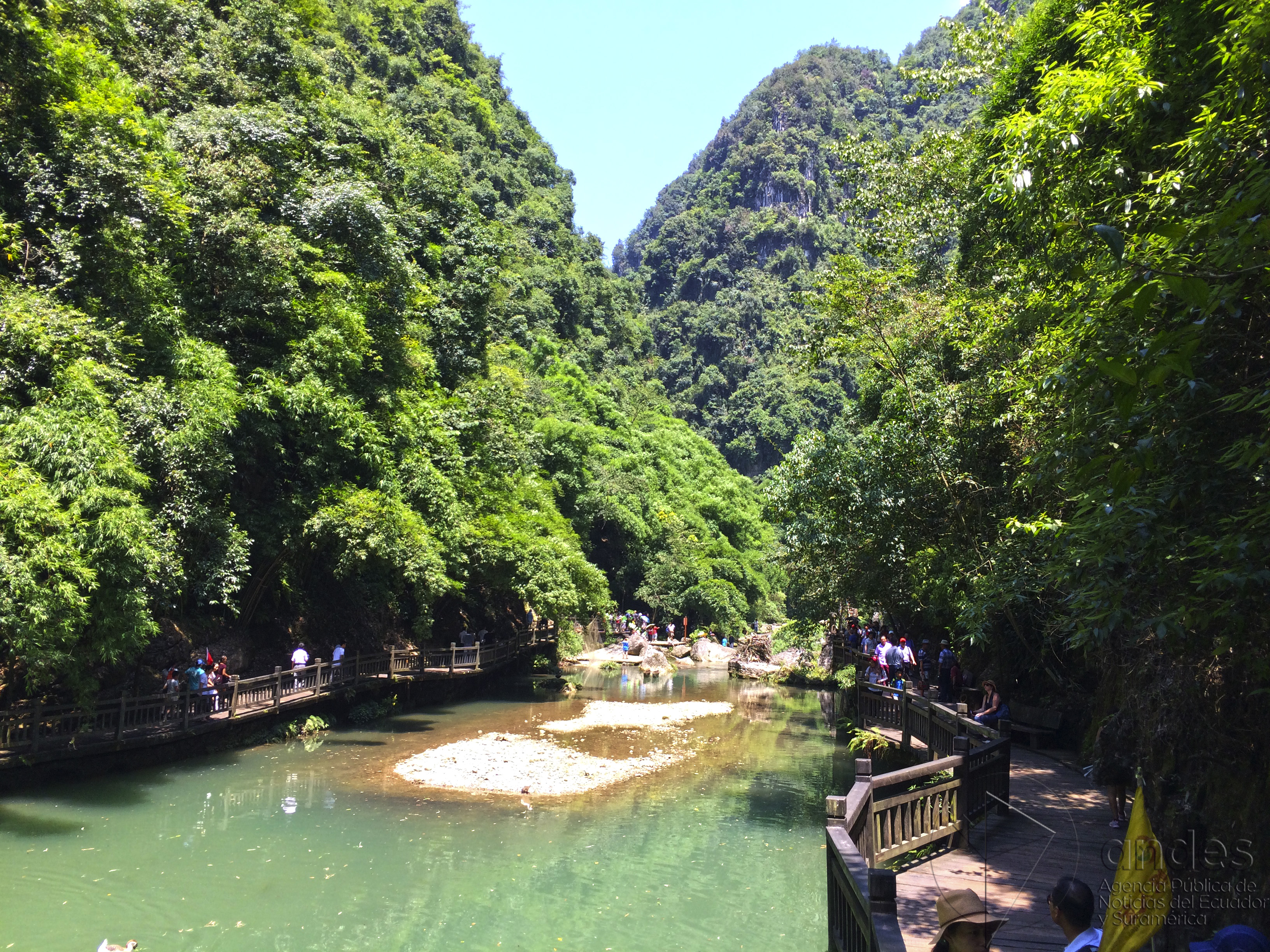 Beijing, 31 julio 2017 (Andes).- Ataúdes colgando de la montaña, un riachuelo azul en medio de la selva, monos salvajes, rituales ancestrales para recibir a los barcos, entre otras cosas, son parte de los atractivos turísticos de la Tribu de las Tres Gargantas, un área natural a las orillas del río Yangtzé, en el sureste de China. Por su riqueza natural el sector ha sido catalogado como un “Centro de Protección de la Cultura Popular y Arte de las Tres Gargantas” y se ha convertido en uno de los cinco principales atractivos de la ciudad de Yichang, en la provincia de Hubei, y cada año recibe a miles de turistas, principalmente del interior del país. ANDES/Lizette Abril. This file comes from the Flickr stream of the Public News Agency of Ecuador and South America and is copyrighted. This file is verified as being licenced under an appropriate Creative Commons licence. In short: you are free to modify the file as long as you attribute Photographer name/Andes and distribute it under the same licence. This tag does not indicate the copyright status of the attached work. A normal copyright tag is still required. See Commons:Licensing for more information. English | español | +/−